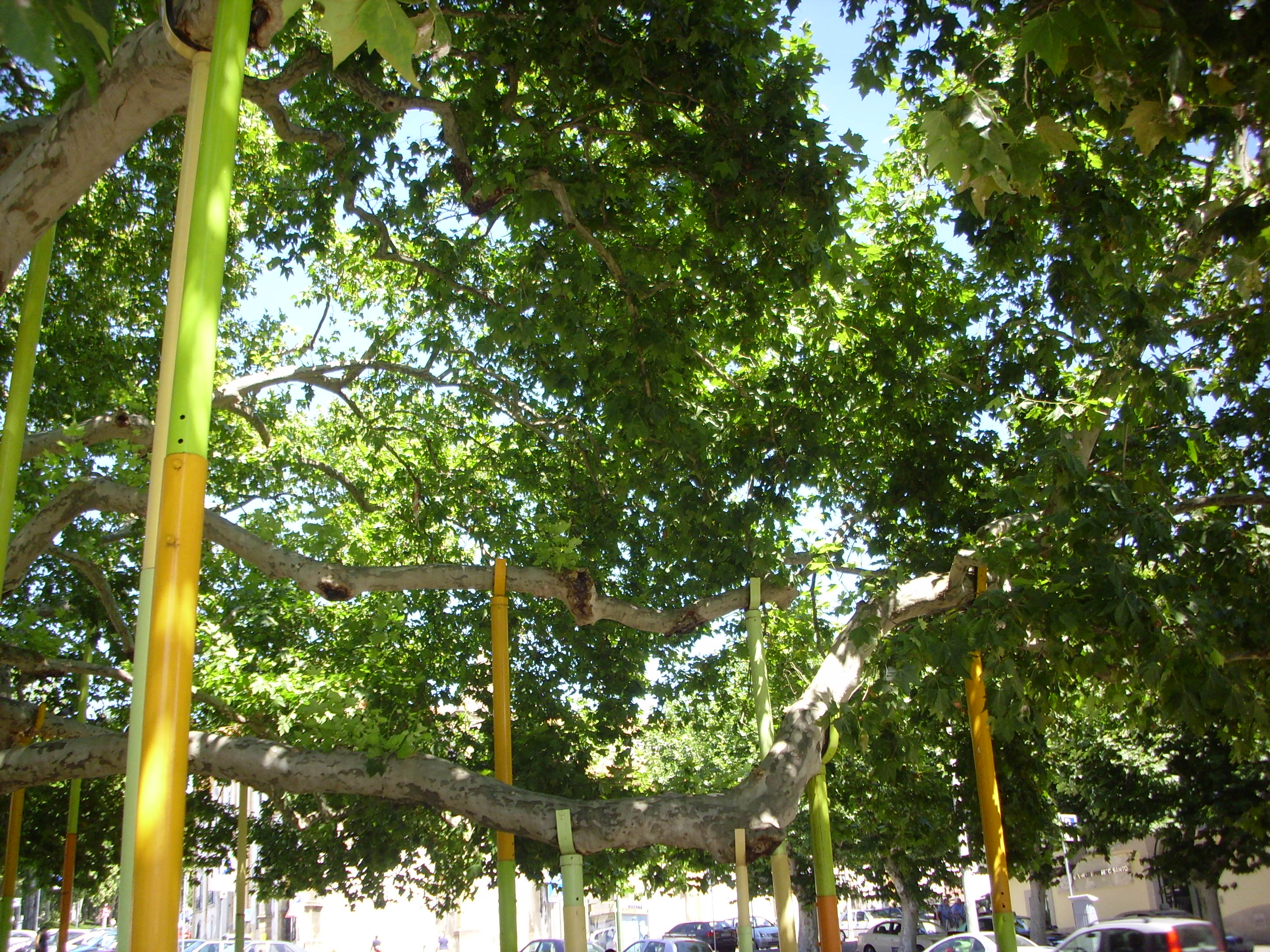 Portalegre